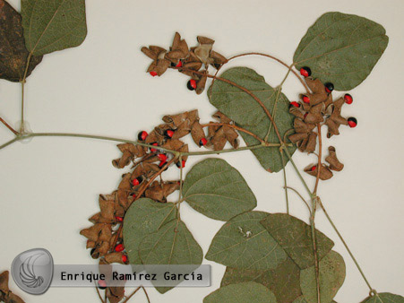 Detalle del ejemplar de Rhynchosia precatoria